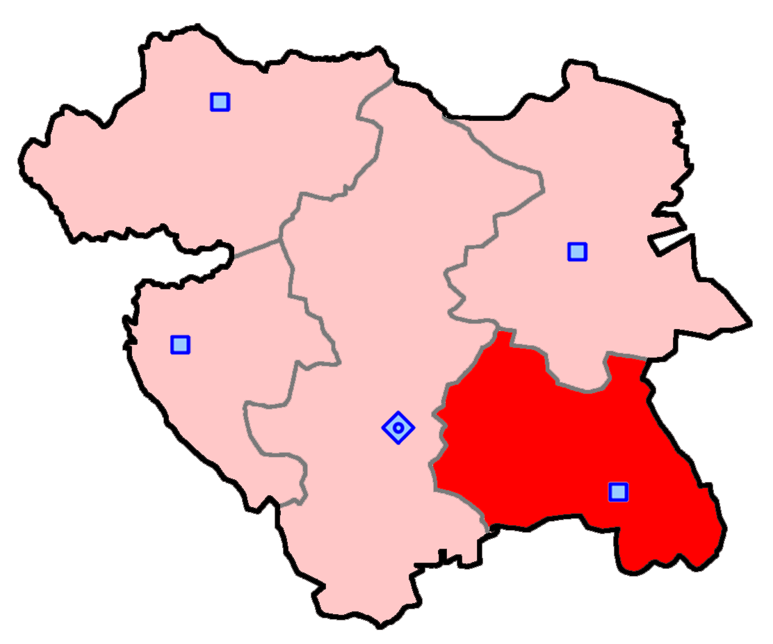 قروه و دهگلان برای انتخابات مجلس شورای اسلامی